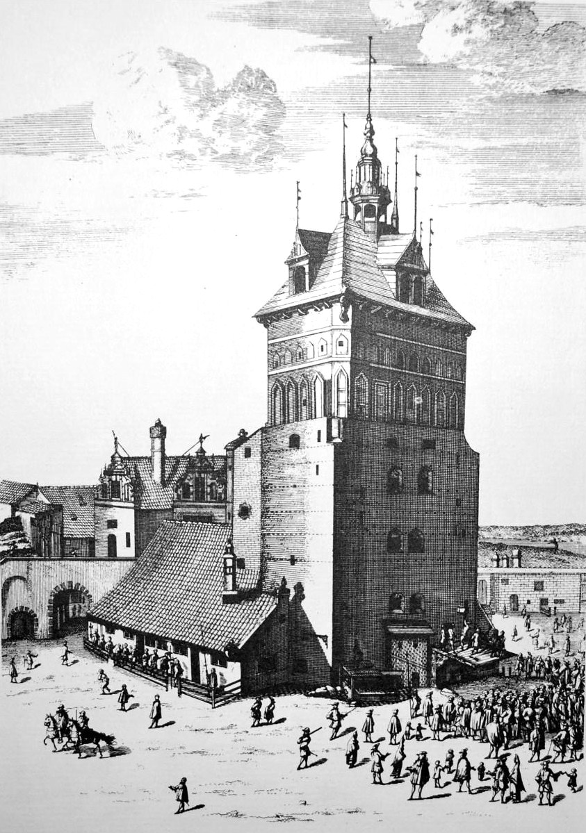 Barbakan (na pierwszym planie Wieża Więzienna, w głębi Katownia) w Gdańsku.